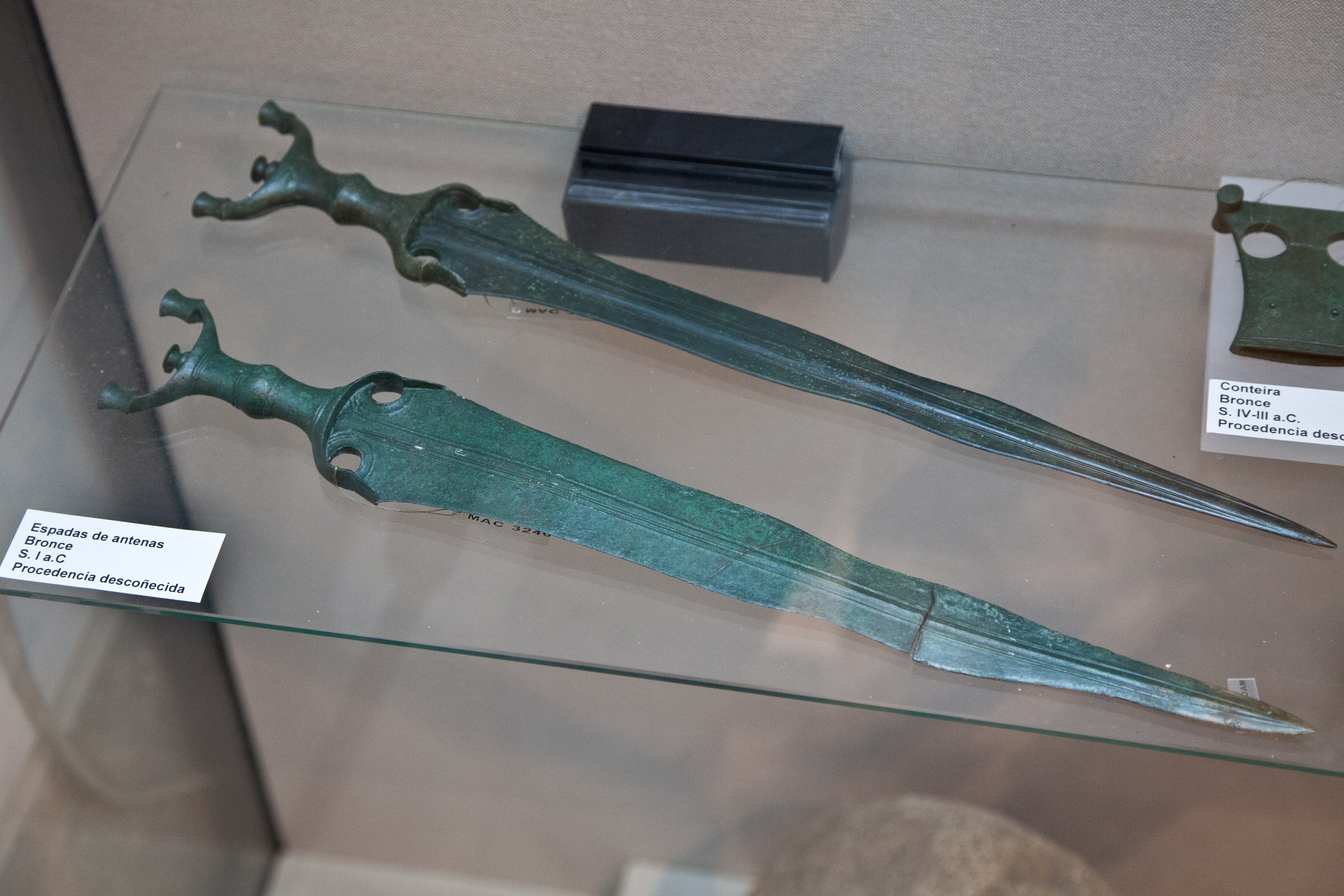 Bronce s. I a.C. Procedencia descoñecida.